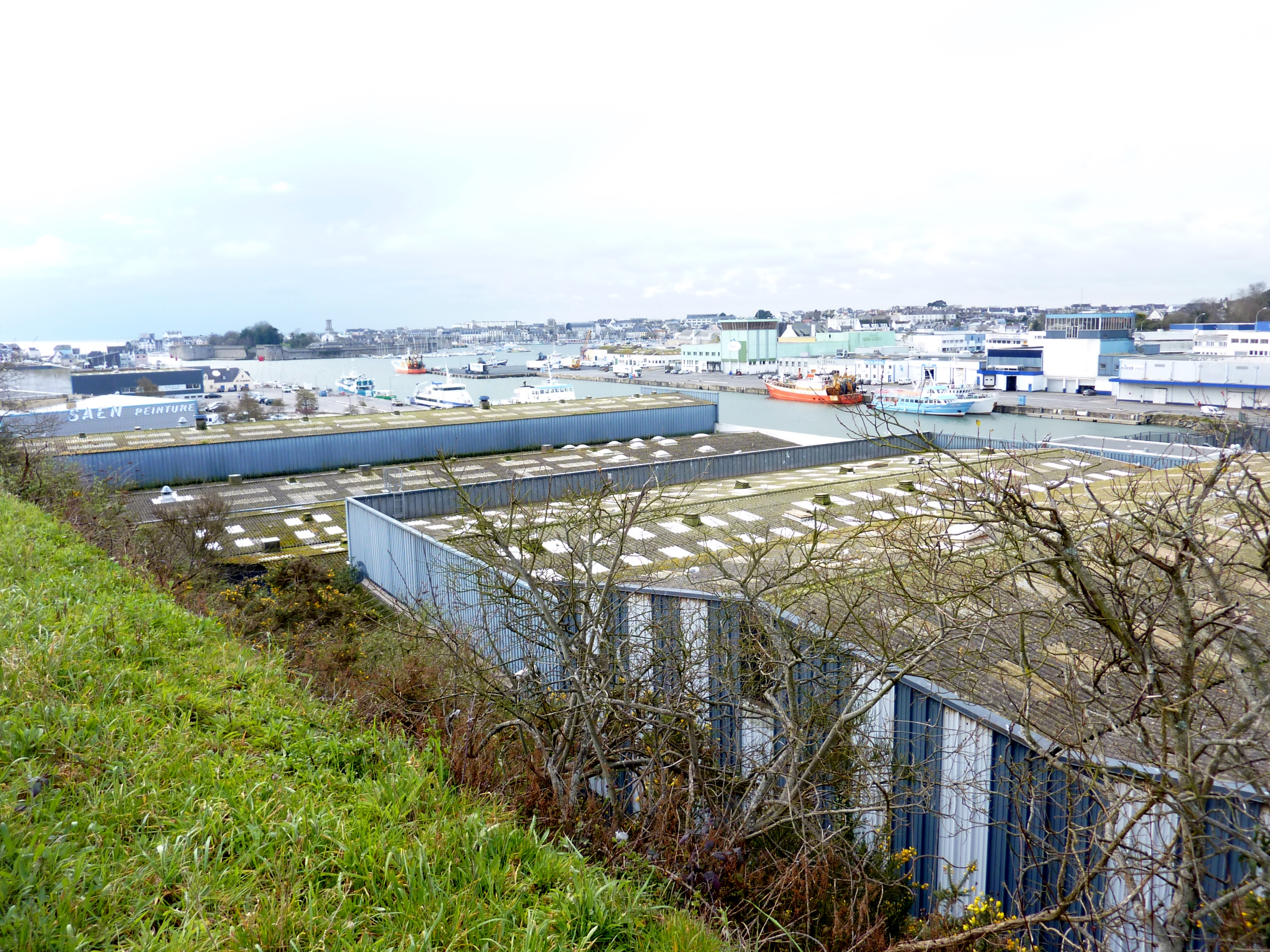 Concarneau : le port de pêche et la "Ville close", vus de la route menant au Passage-Lanriec ; au premier plan, les bâtiments industriels de la construction et réparation navale.